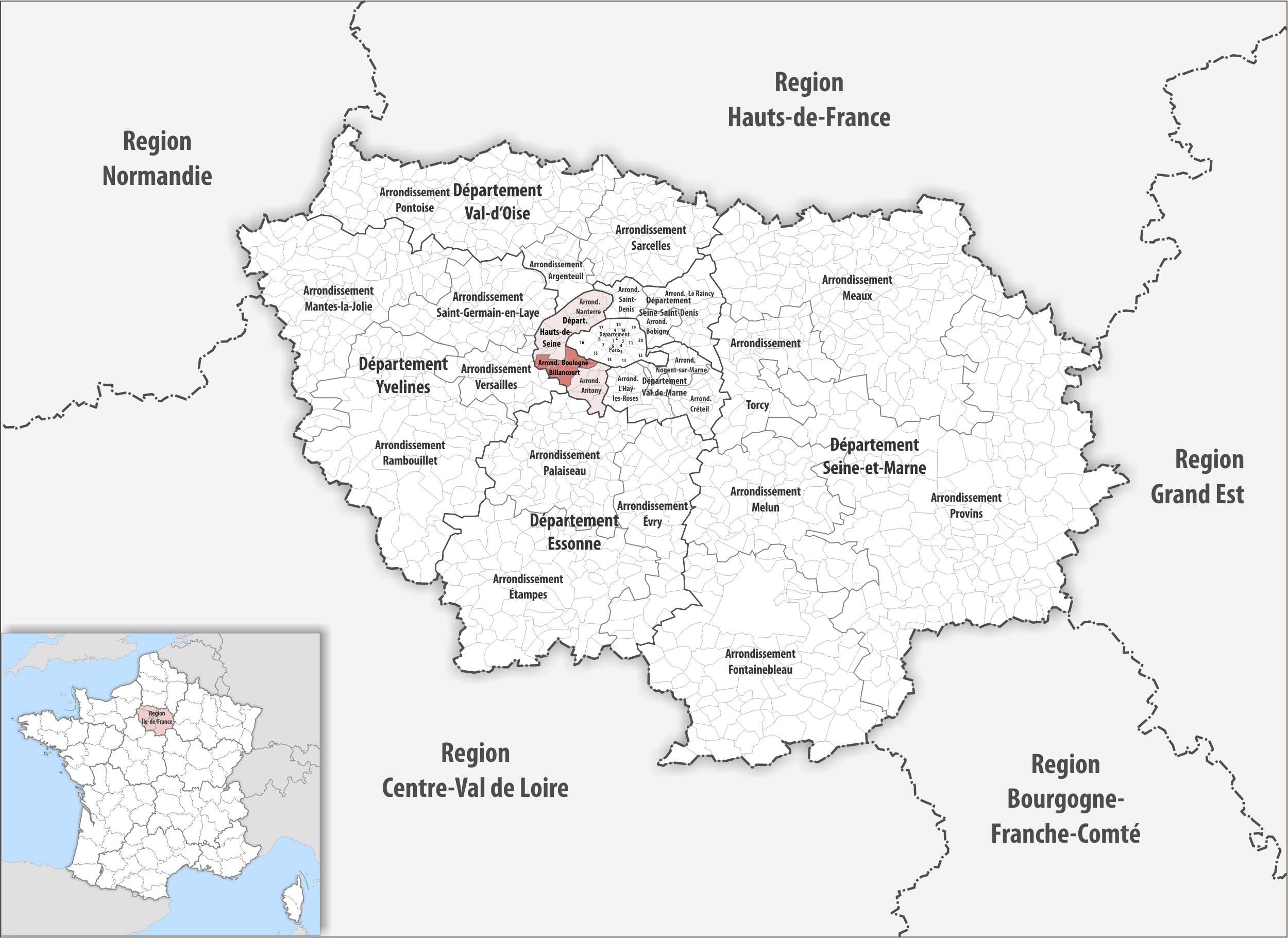 Lage des Arrondissements Boulogne-Billancourt